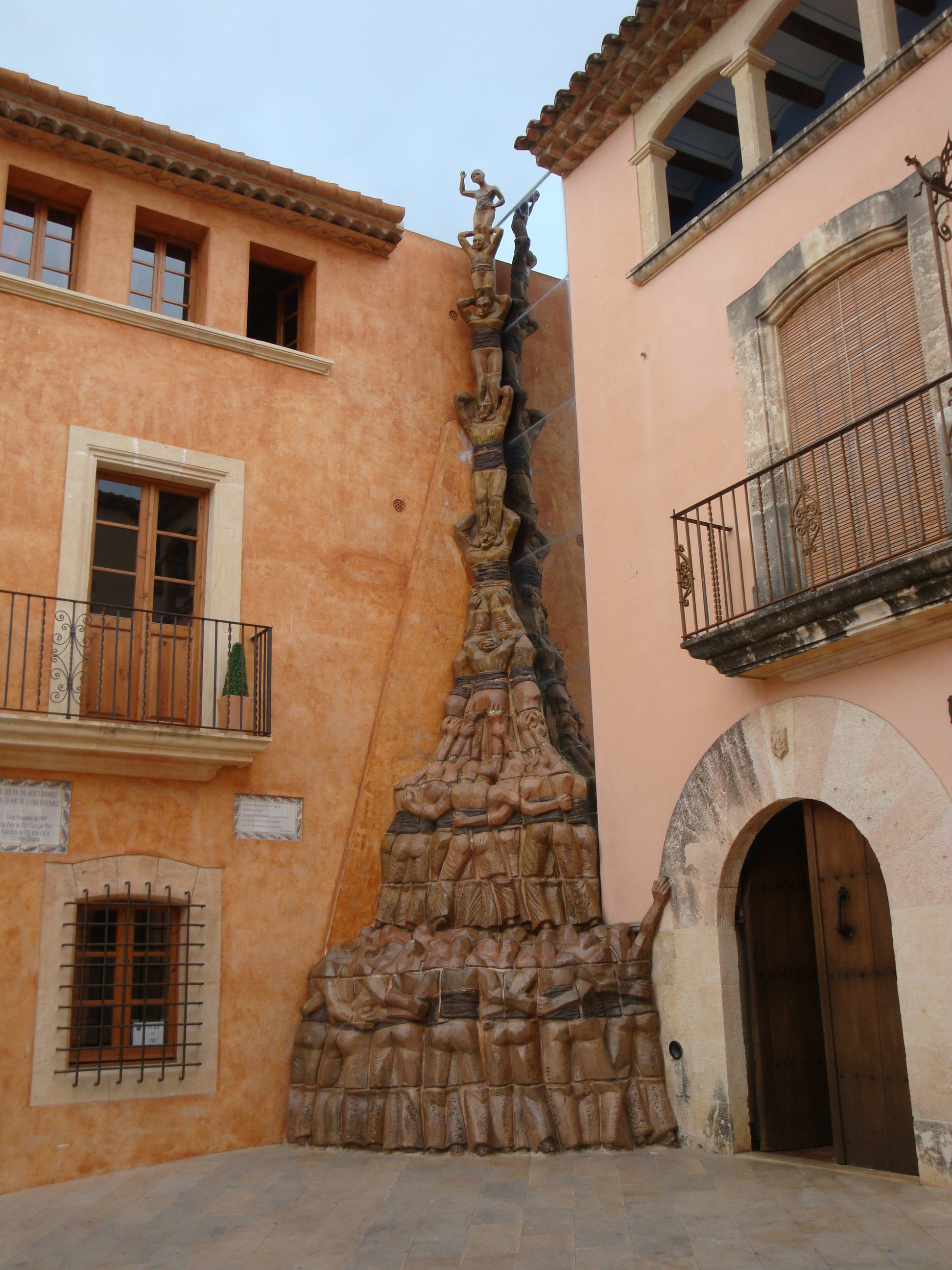 Alt relleu de ceràmica refractària esmaltada. 10 metres d'alçaria. Obra de Martí Royo, inaugurada el 12 de novembre de 1989 a la Plaça del Pou d'Altafulla. Al.legòric al Pilar de vuit aixecat en aquesta plaça per la Colla Vella dels Xiquets de Valls el 1878.